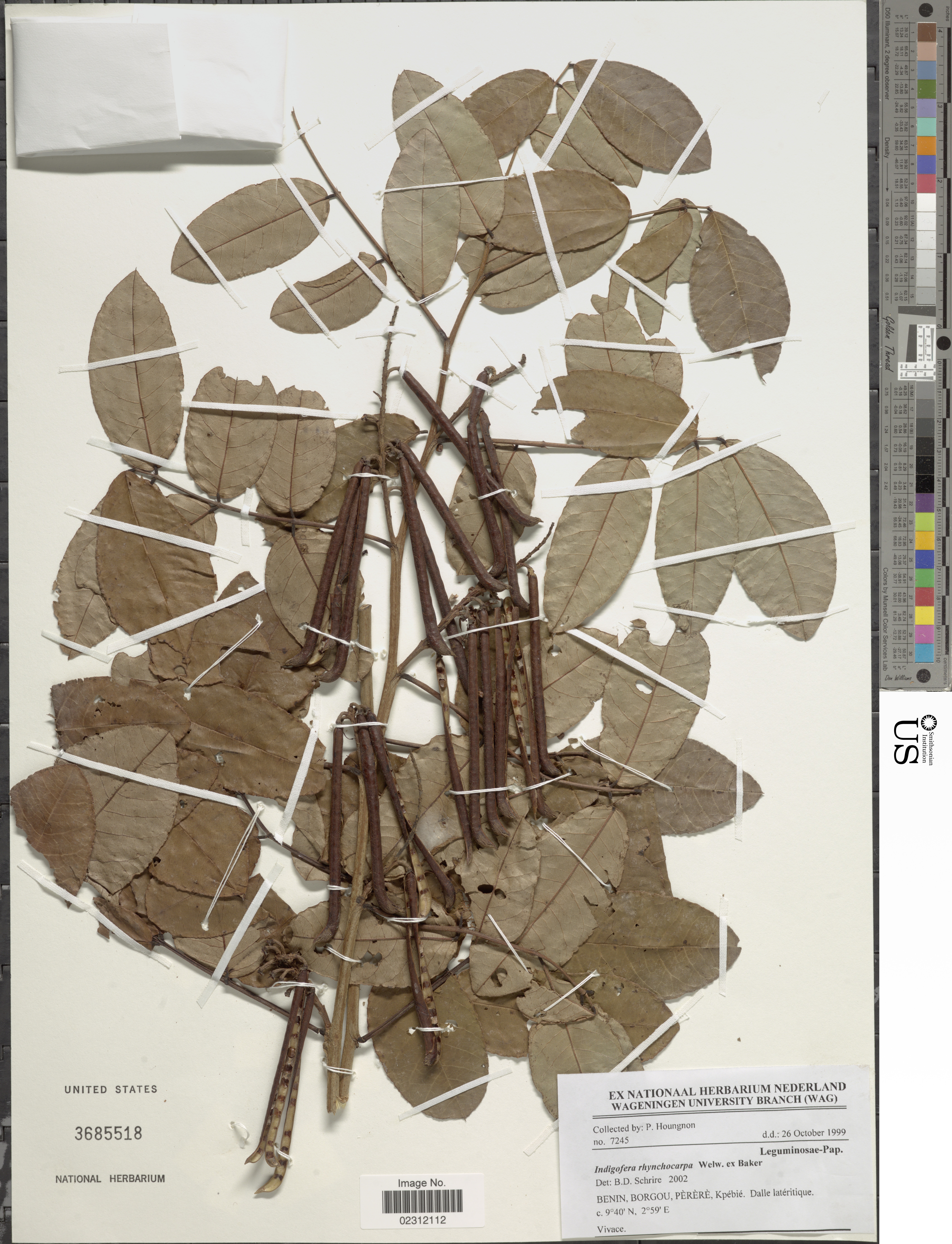 Indigofera rhynchocarpa Object Details Biogeographical Region 22 - West Tropical Africa Collector P. Houngnon Record Last Modified 29 Dec 2017 Specimen Count 1 Collection Date 26 Oct 1999 Barcode 02312112 USNM Number 3685518 Place Perere, Kpebie, Borgou, Benin, Africa Published Name Indigofera rhynchocarpa Taxonomy Plantae Dicotyledonae Rosales Fabaceae Faboideae NMNH - Botany Dept. Record ID nmnhbotany_13323251 Usage of Metadata (Object Detail Text) CC0 GUID (Link to Original Record)